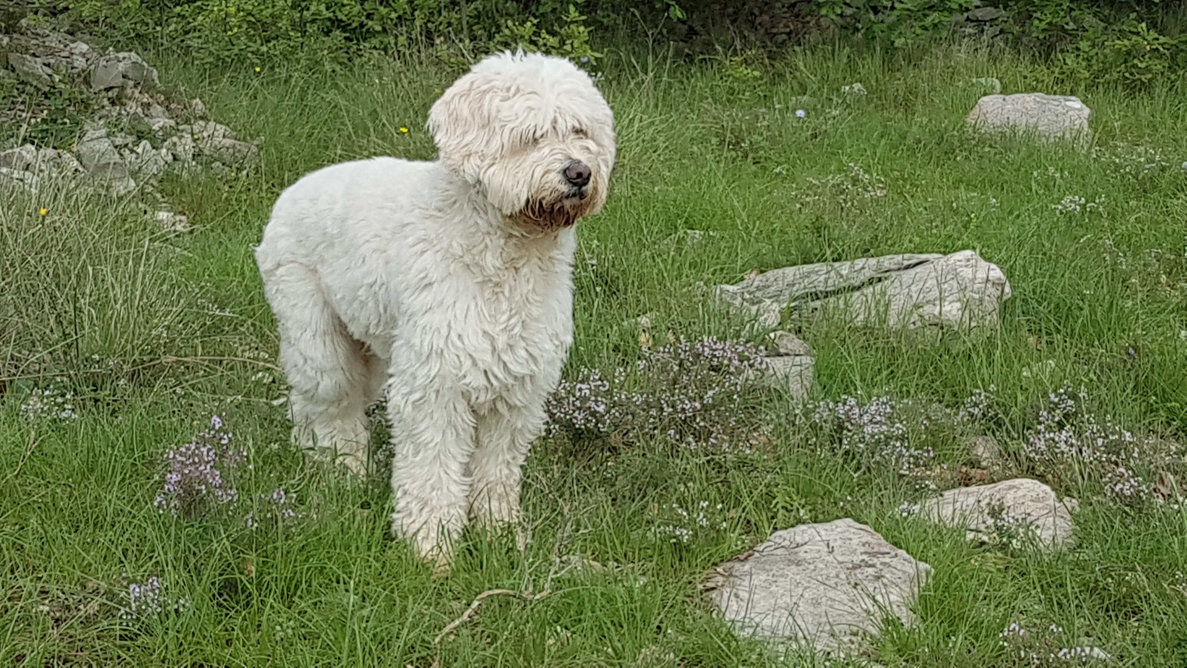 Barbado da Terceira in de kleur wit (amarello claro)